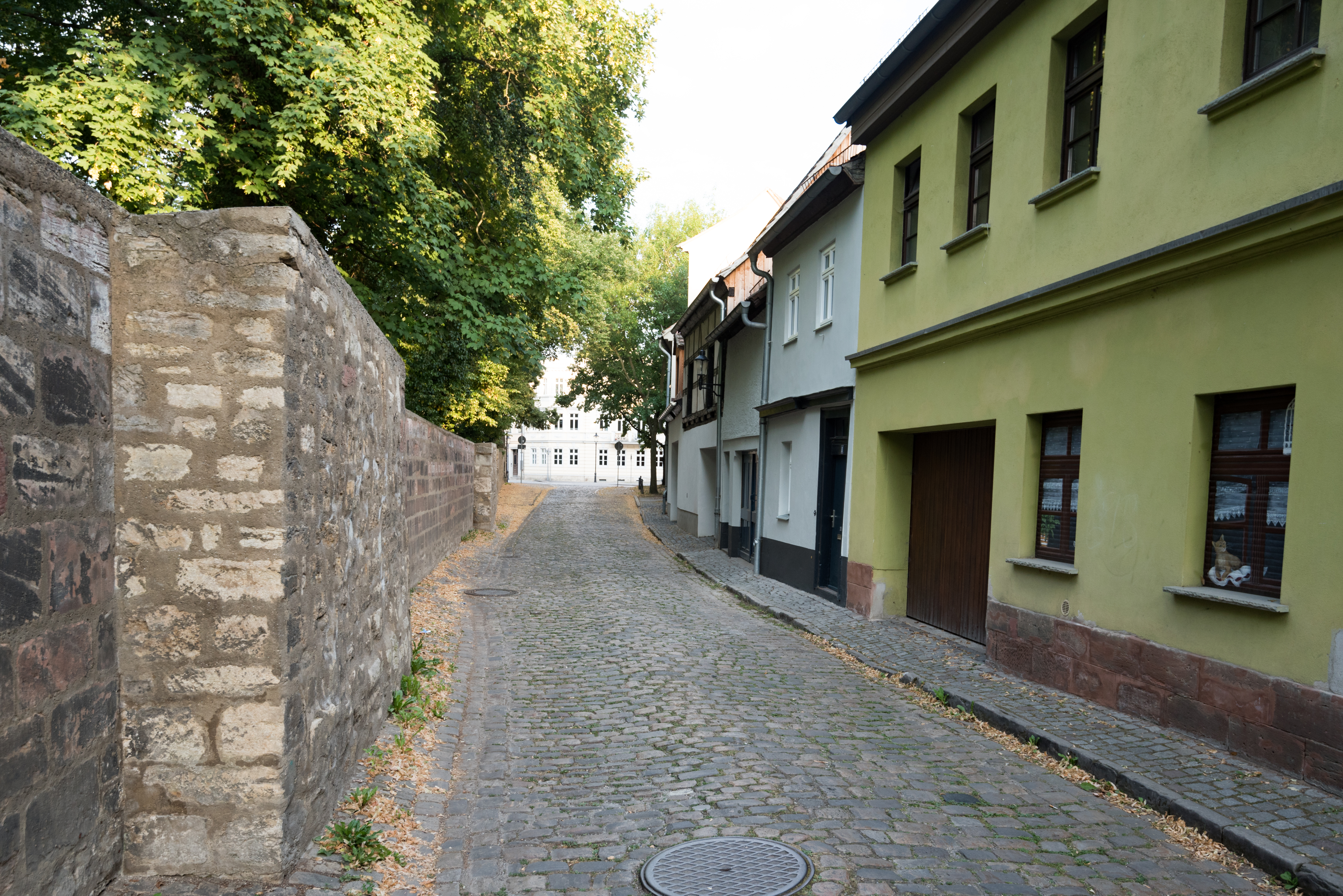 Naumburg (Saale), Neumauer 10, 9, 8, 7